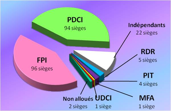 répartition des sièges de l'Assemblée nationale (Côte d'Ivoire) pour la 10ème législature